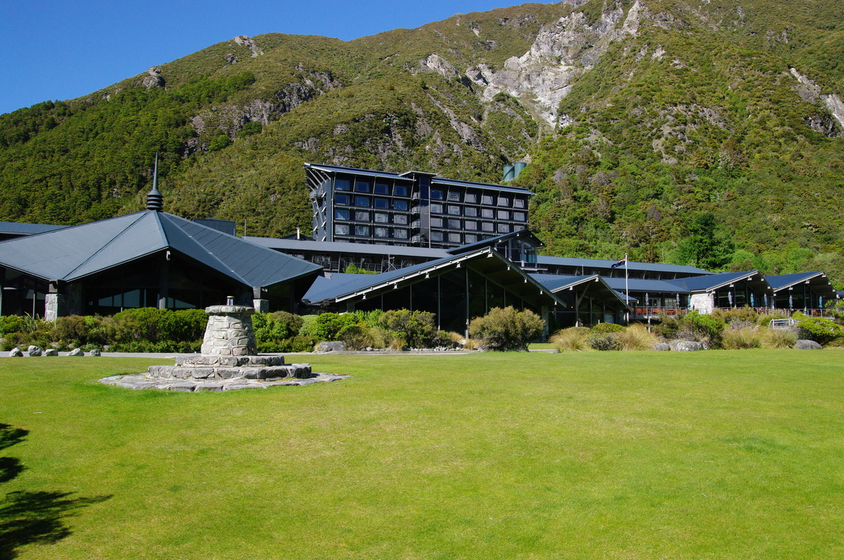 Hermitage Hotel, Aoraki/Mount Cook Nationalpark